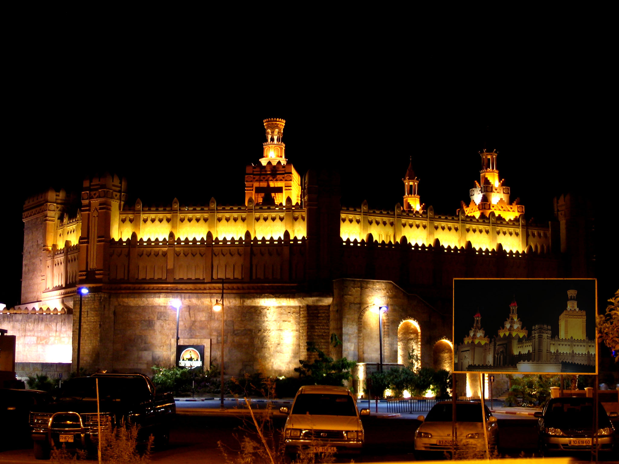 Эйлат, комплекс «Кингс-Сити»